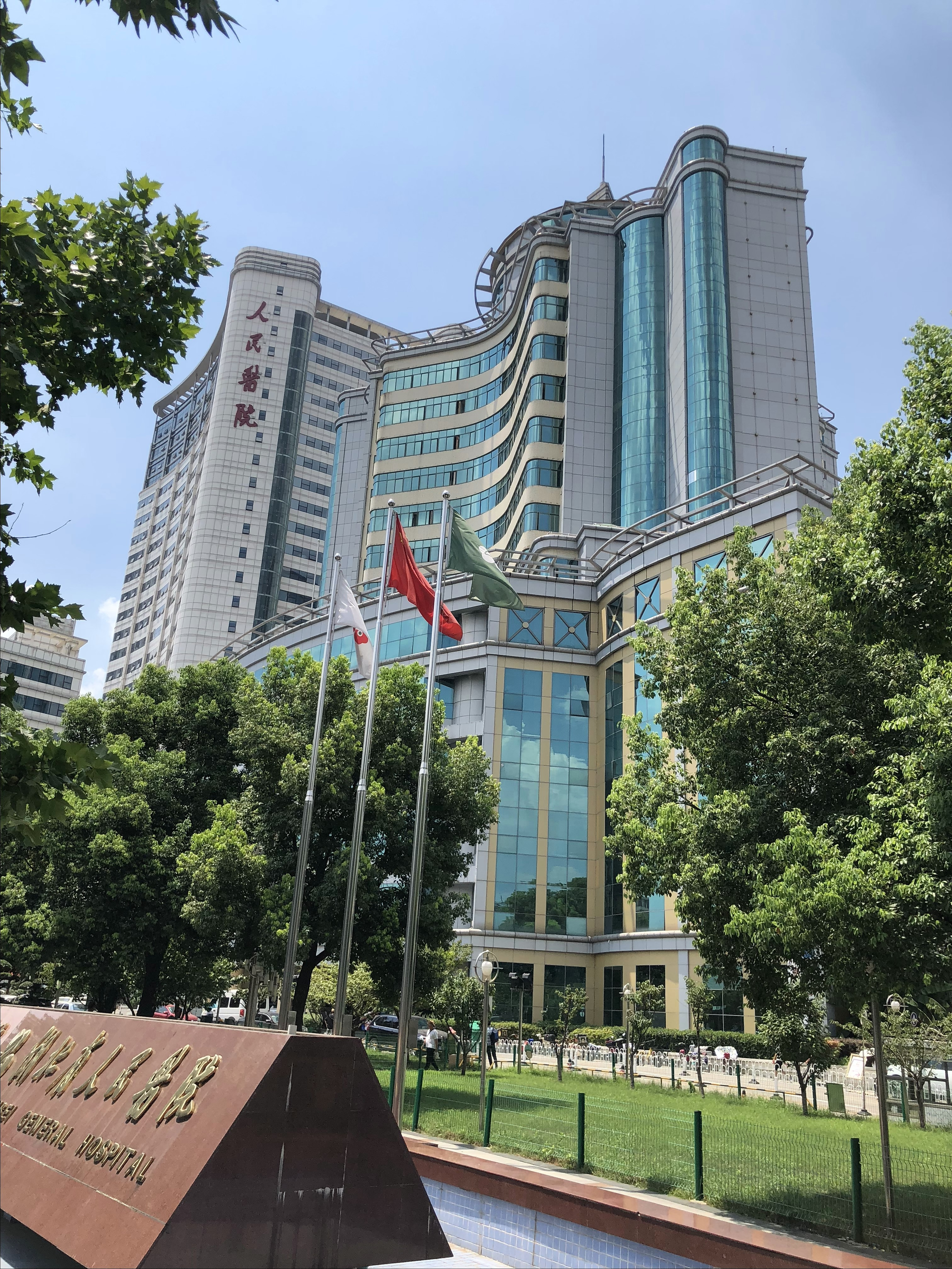 中文（中国大陆）: 湖北省人民医院 泰康楼